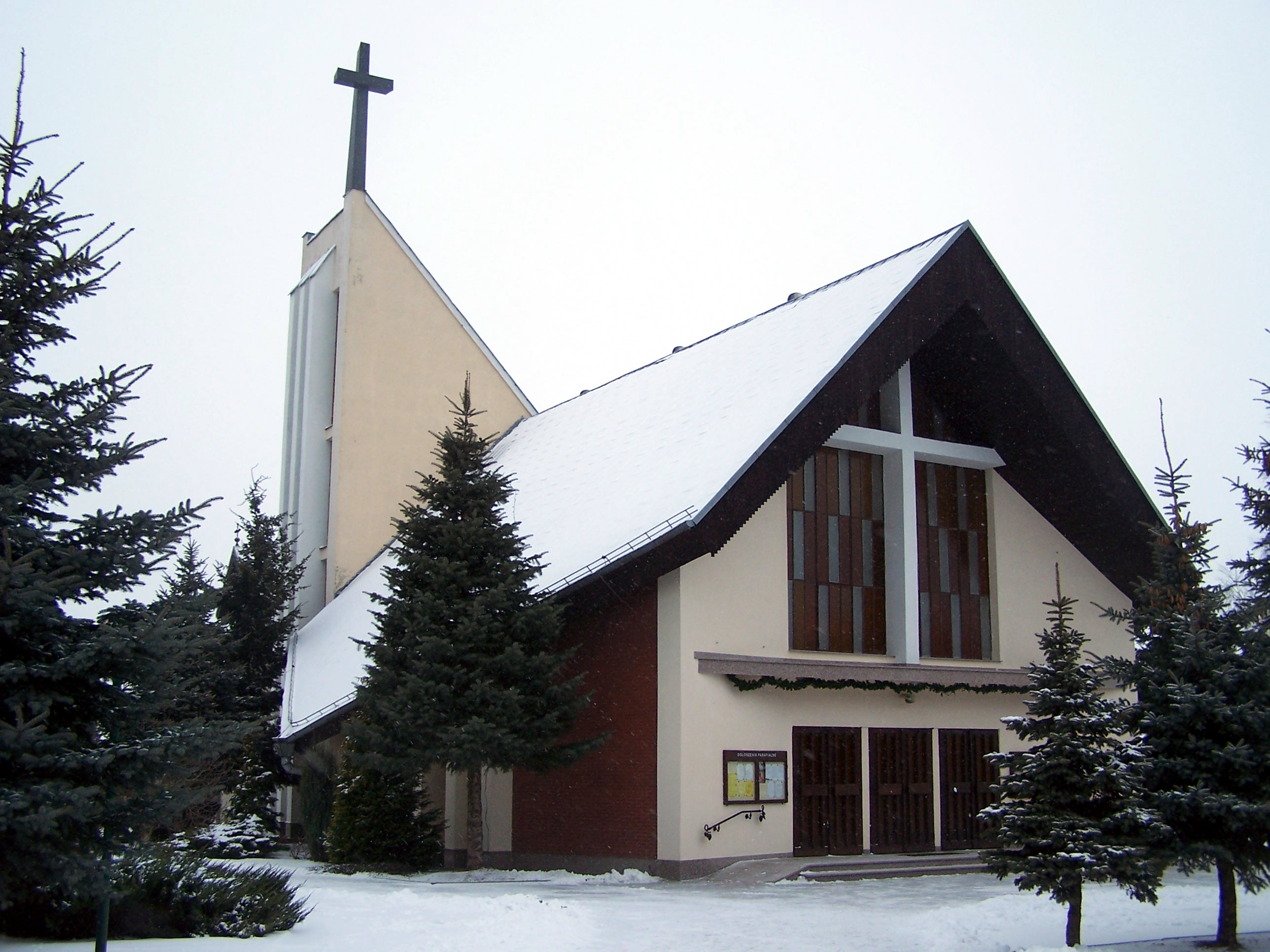 Church of Robakowo, Gmina Kórnik, Poznan County